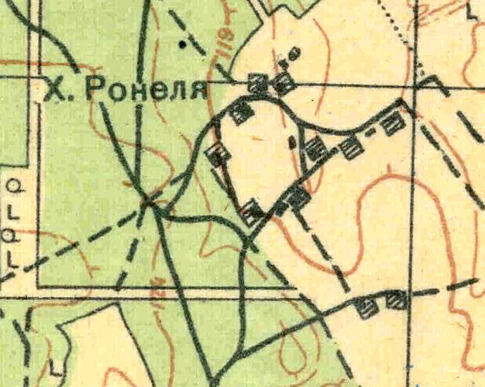 Топографическая карта Ленинградской области, квадрат О-35-24-Б-г (Б. Борницы), деревня Ронилово